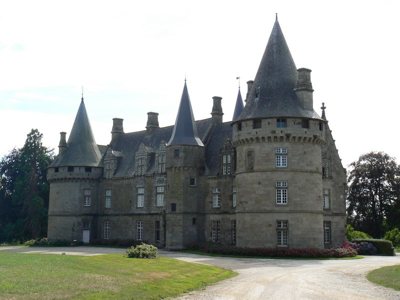 Château de Bonnefontaine aile est à Antrain (Bretagne)